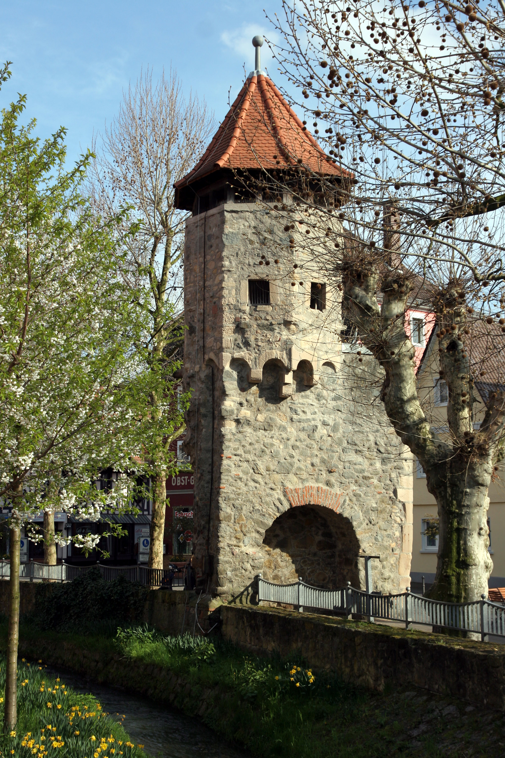 Der Bensheimer Rinnentorturm